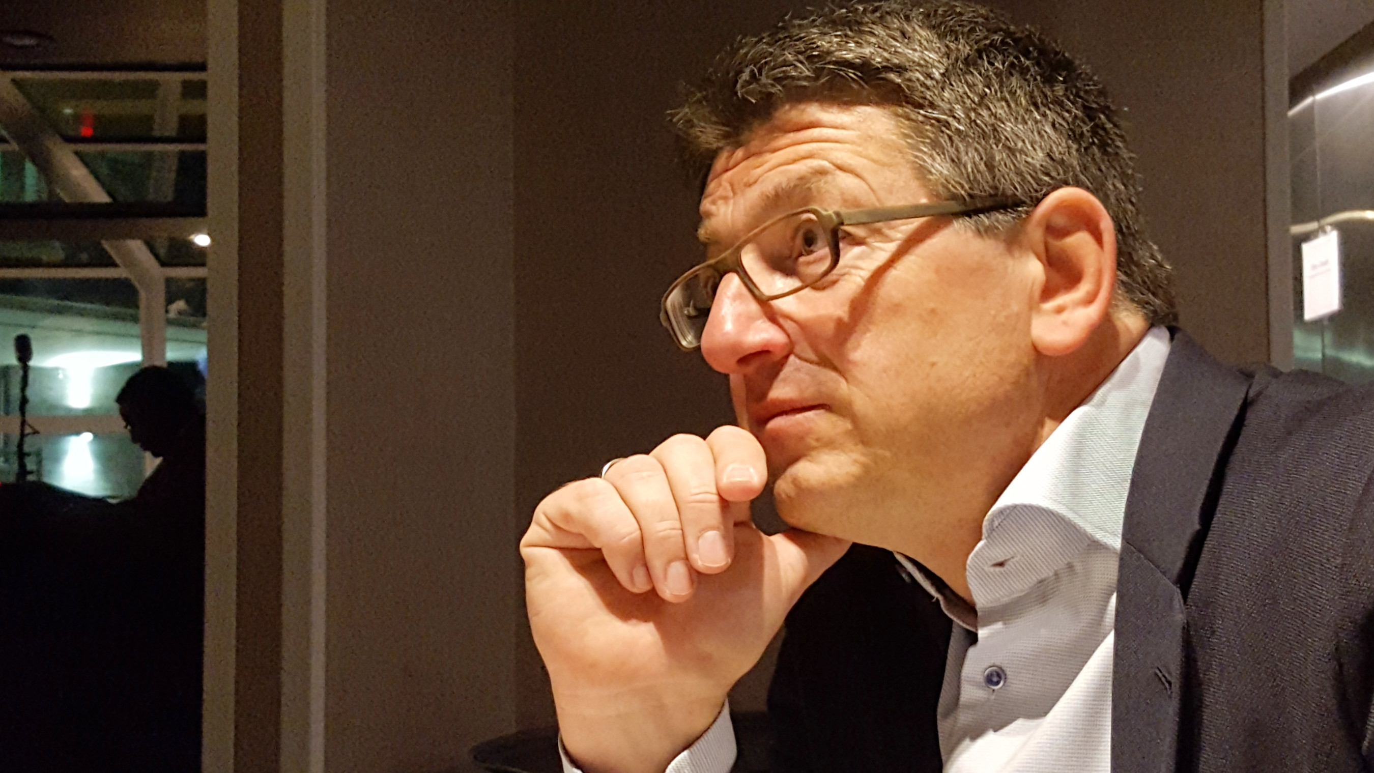 Abschiedsdinner am Ende des USA-Teils der Humboldtreise, im Bild Matthias Glaubrecht, Leiter des Naturkundemuseums in Hamburg und Humboldtexperte